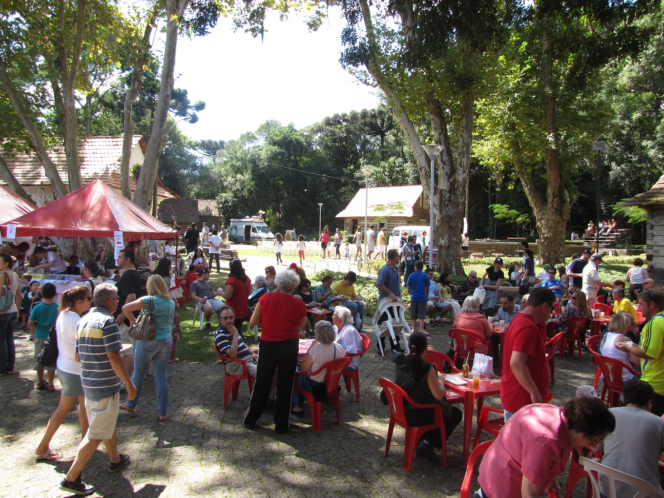 Bosque do Papa.